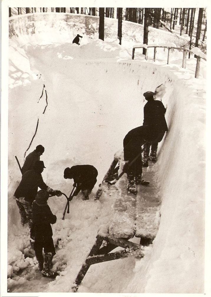 "Che cosa sia la guidoslitta (vulgo bob) non è un mistero per nessuno da quando si rinnova ogni stagione a Cortina i più grandi e importanti campionati del mondo di questa specialità invernale. Lo sport del battibaleno a bordo di una slitta razionale, solida, bassa, sensibilissima alla guida scende a precipizio sul fondo ghiacciato lungo un percorso sinuoso. Ecco qui come si sta ultimando la costruzione della bellissima pista".